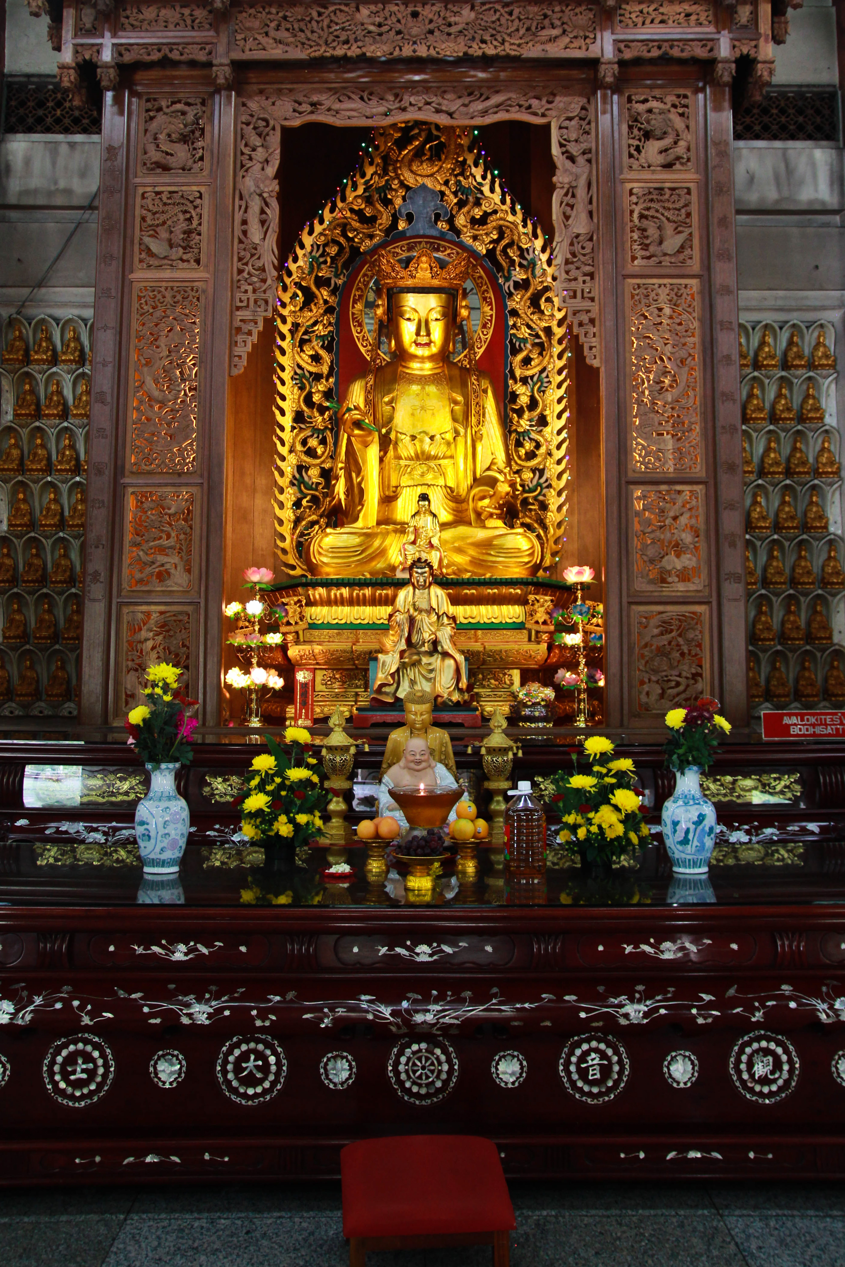 Kek Lok Si Tempel, Georgetown, Penang